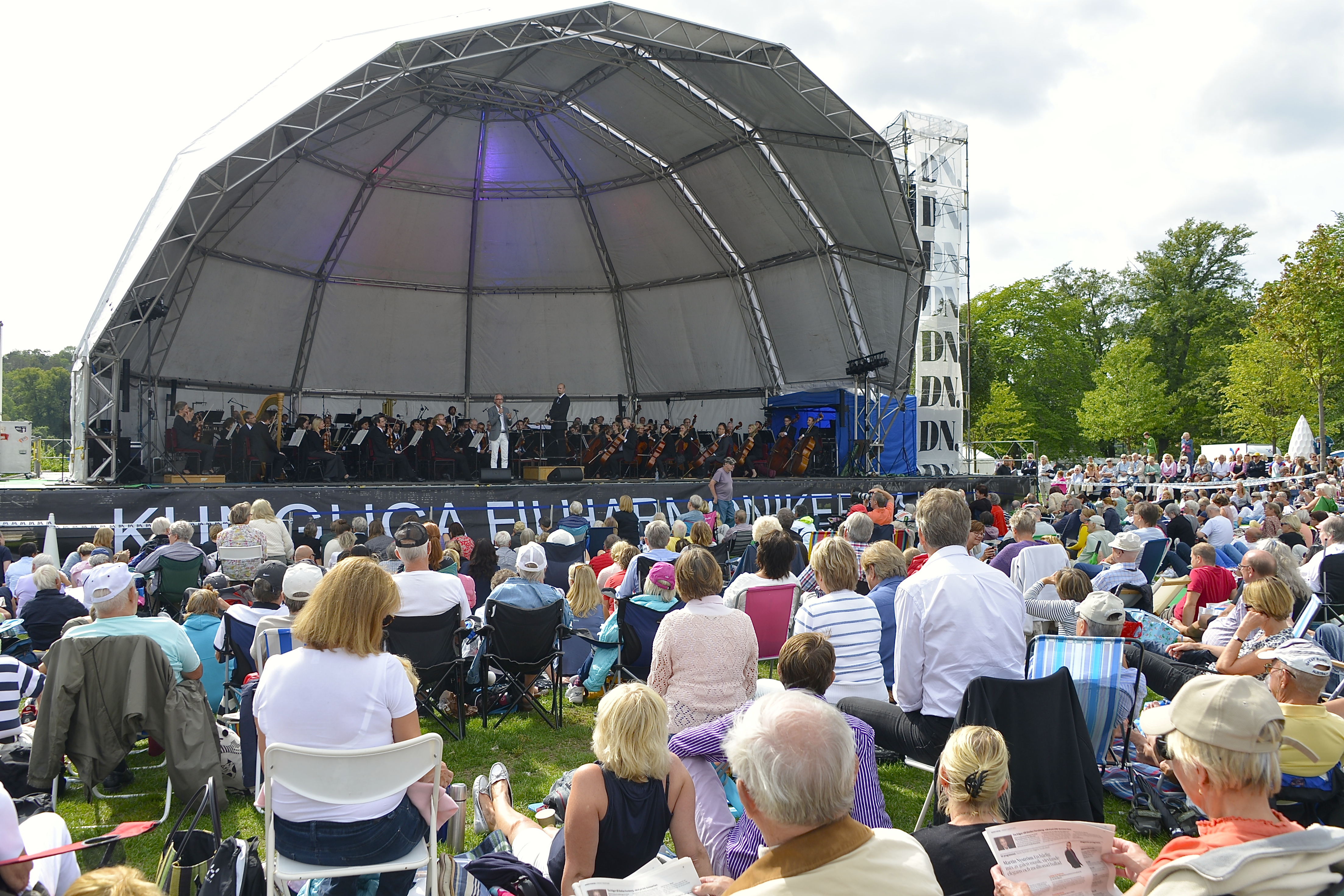 DN-konserten med Kungliga Filharmonikerna på Gärdet vid Sjöhistoriska museet den 17 augusti 2014. Årets solist är sångerskan Lisa Nilsson. Värd är konserthuschef Stefan Forsberg. Dirigent är David Björkman.